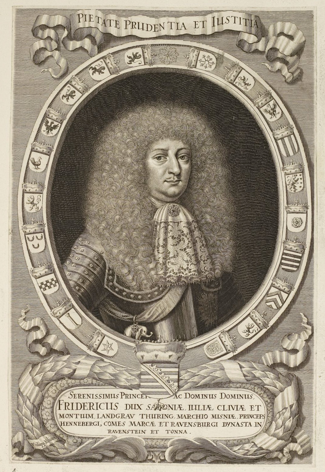 Grafik aus dem Klebeband Nr. 1 der Fürstlich Waldeckschen Hofbibliothek Arolsen Motiv: Herzog Friedrich I. von Sachsen-Gotha-Altenburg im Bildrahmen Wappen der Besitzungen bzw. Anspruchswappen